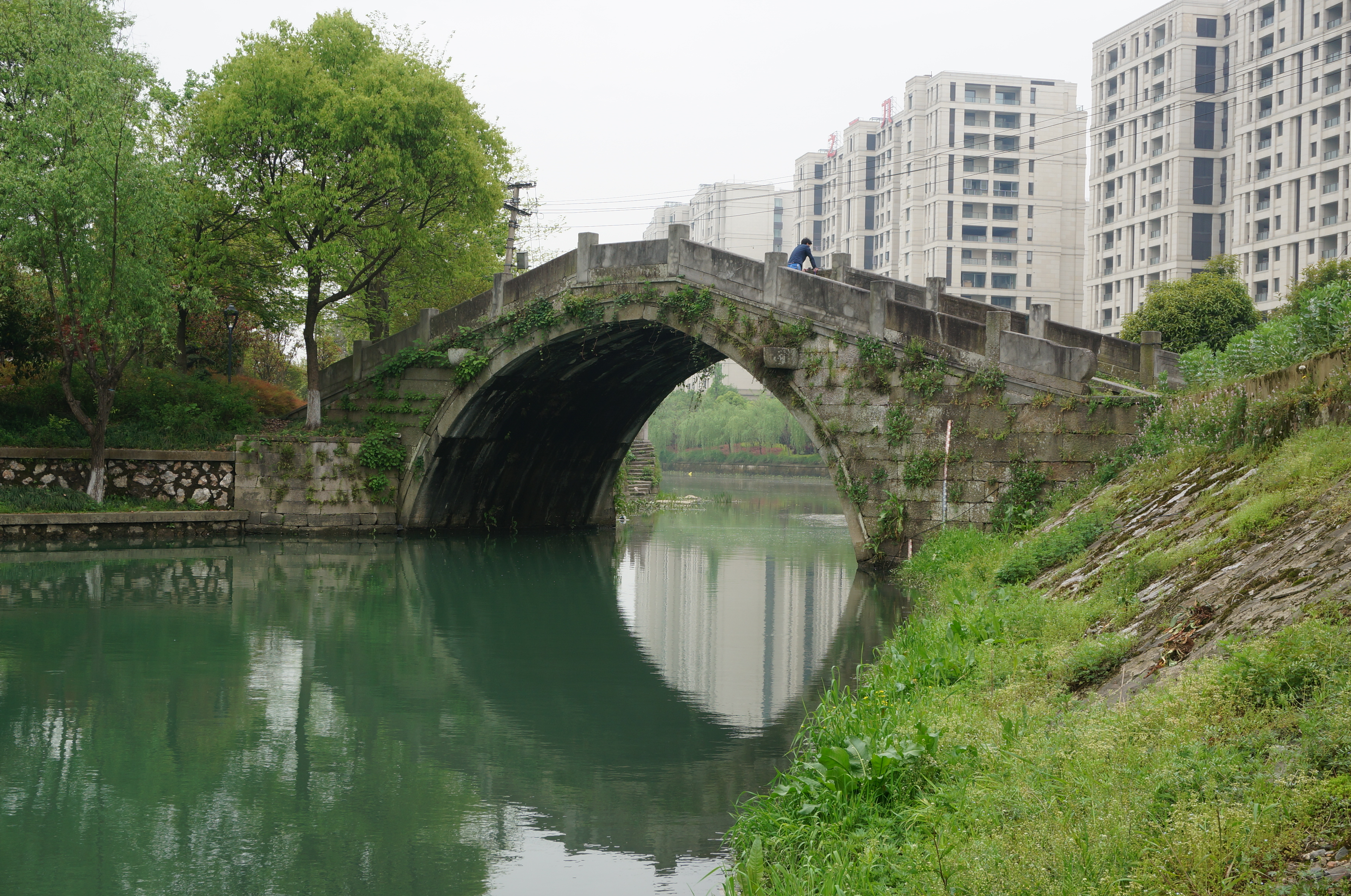 大诸桥，西面。